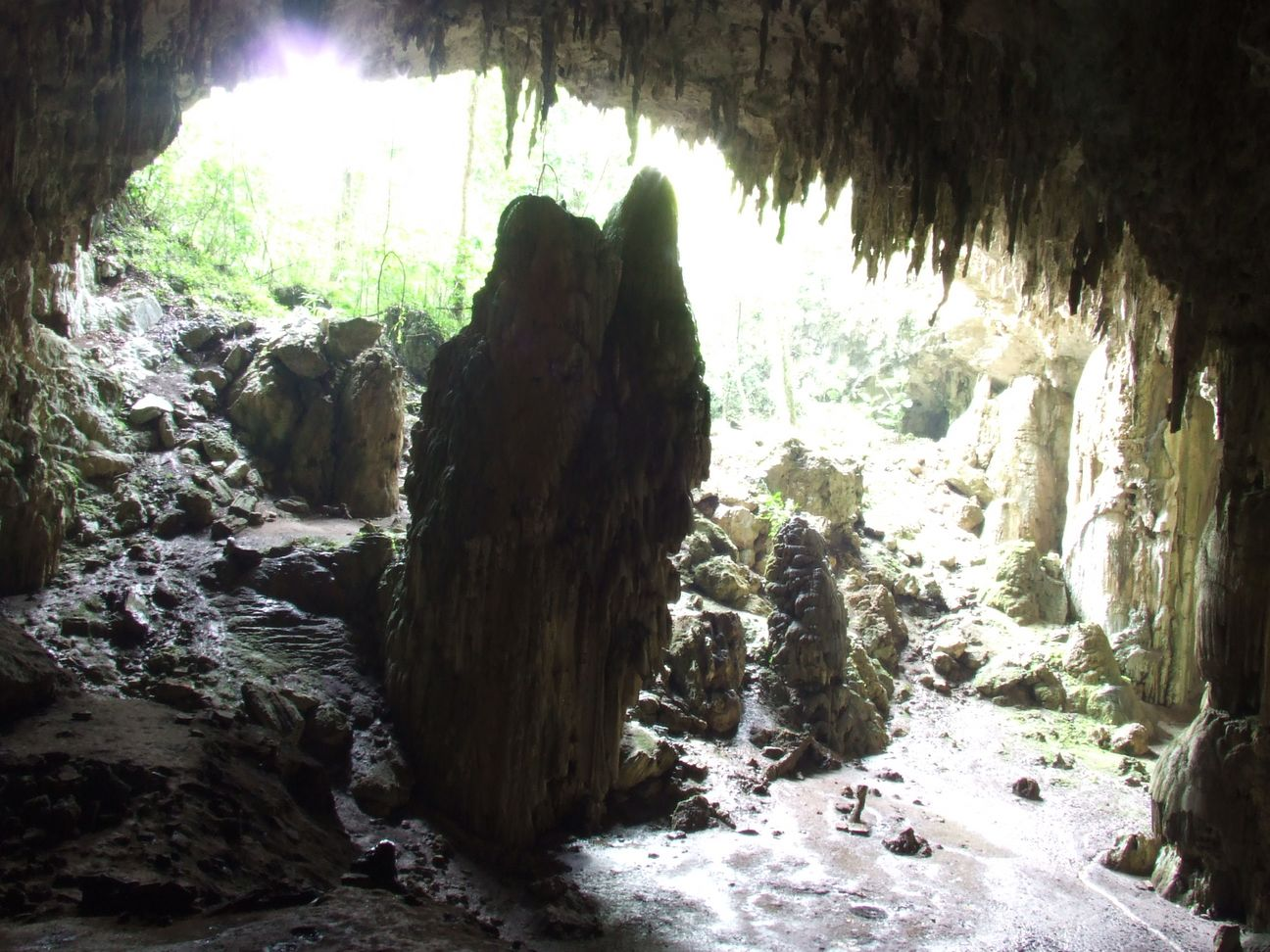 Entrada de la Cueva de Naj Tunich, Guatemala